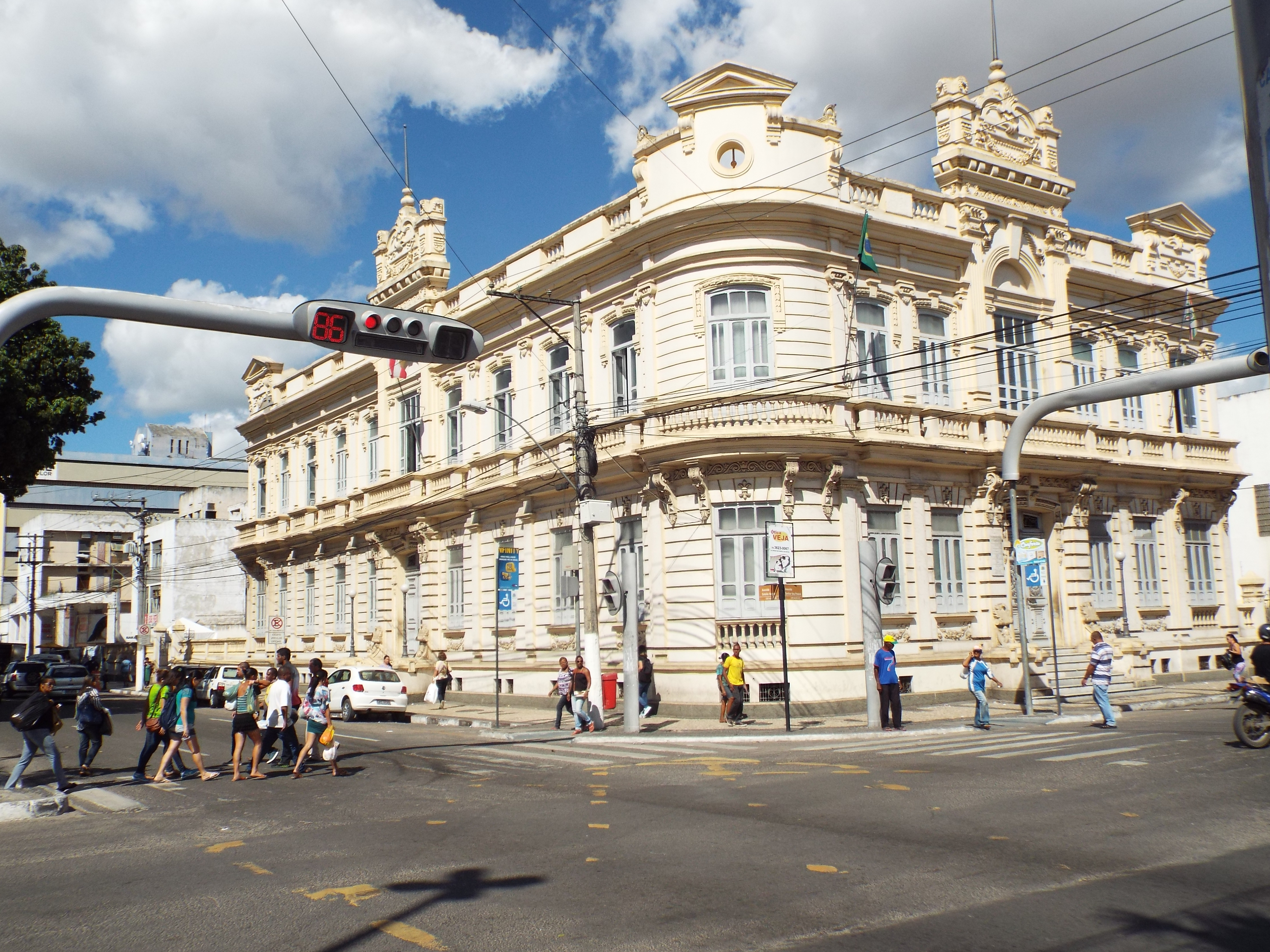 Prefeitura